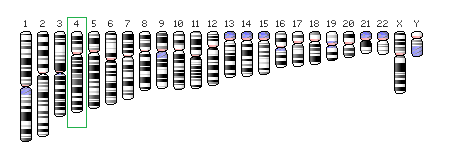 Localització del trl1 al gen humà